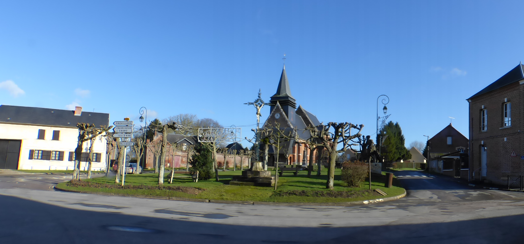 Vue panorammique de la place du Village de Haute-Épine